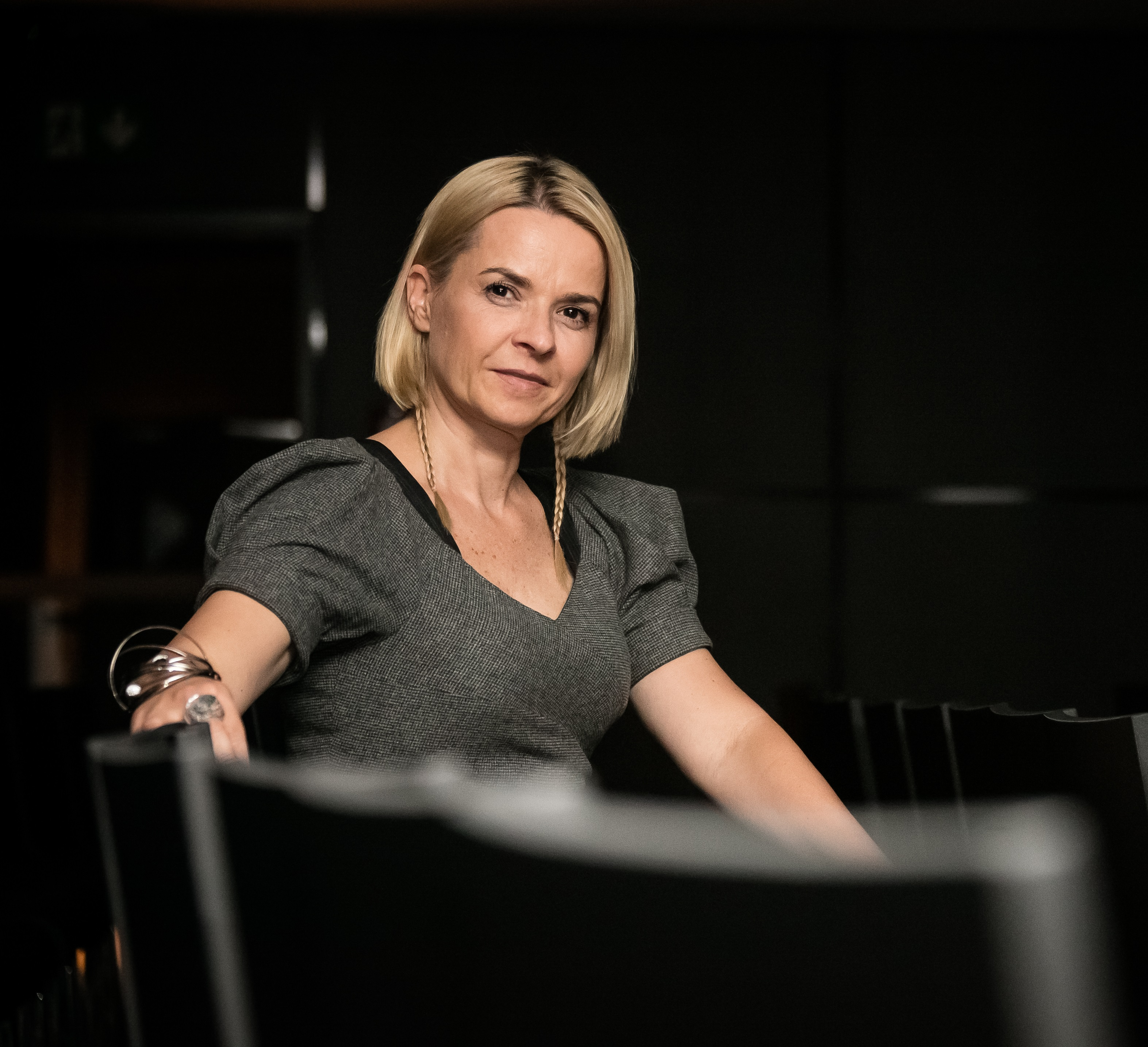 Anna Garbolińska